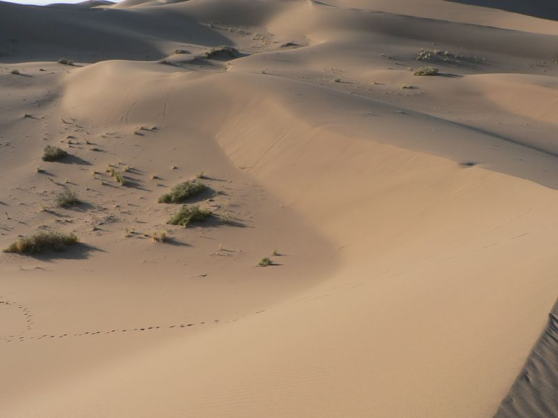 Kaveer (desert) in Yazd Province, Iran